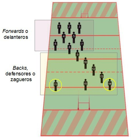 Rugby posiciones. Wing 3/4